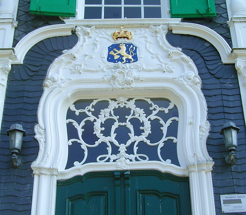 Haus Cleff: Heimatmuseum und Historisches Zentrum in Remscheid / Remscheid town museum